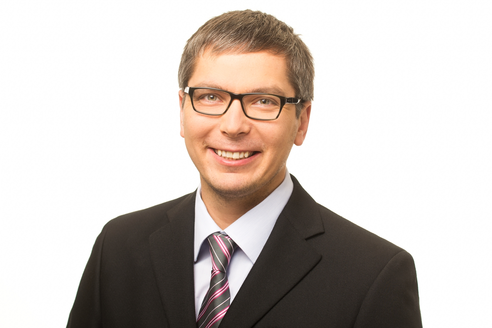 Marko Torm